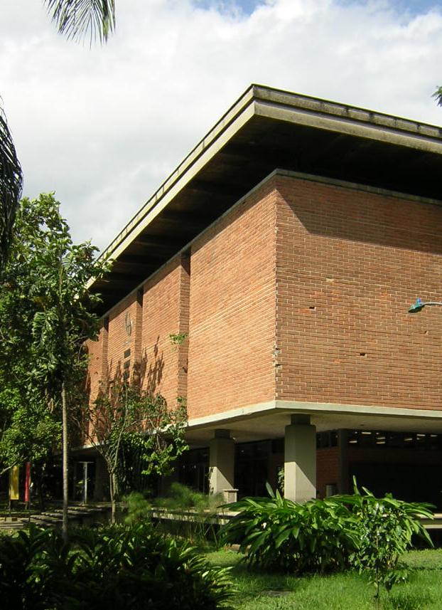 Museo Universitario, Universidad de Antioquia, Medellín, Colombia (esta foto la tome yo, y la libero al dominio público)